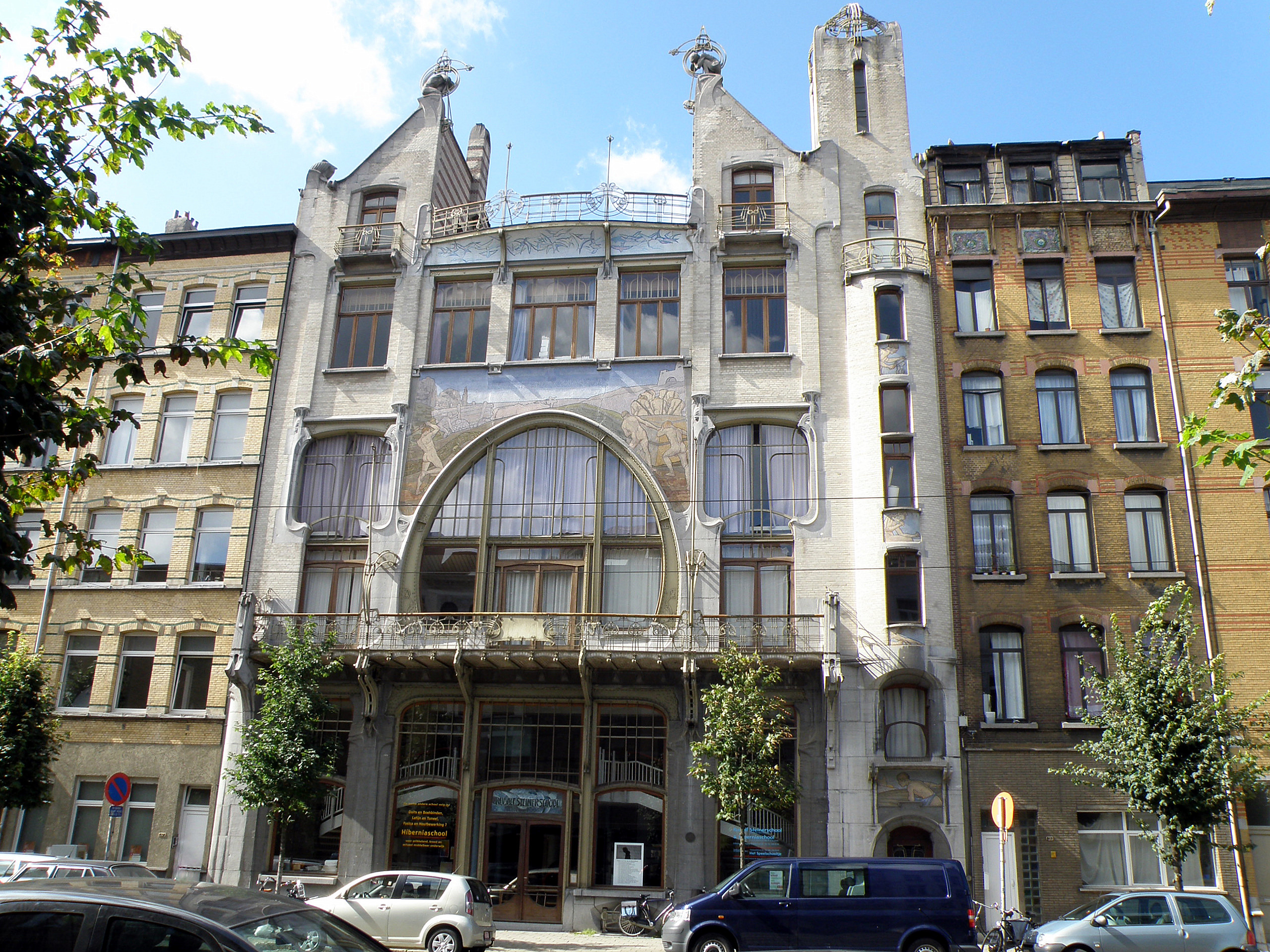 Antwerpen, België. Liberaal Volkshuis "Help U Zelve", aan de Volkstraat. Art nouveau-gebouw n.o.v. archit. Jan van Asperen en Emiel van Averbeke.